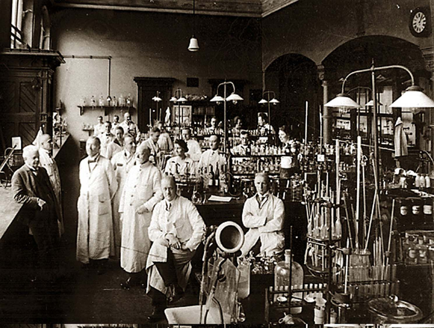 Labor mit Personal